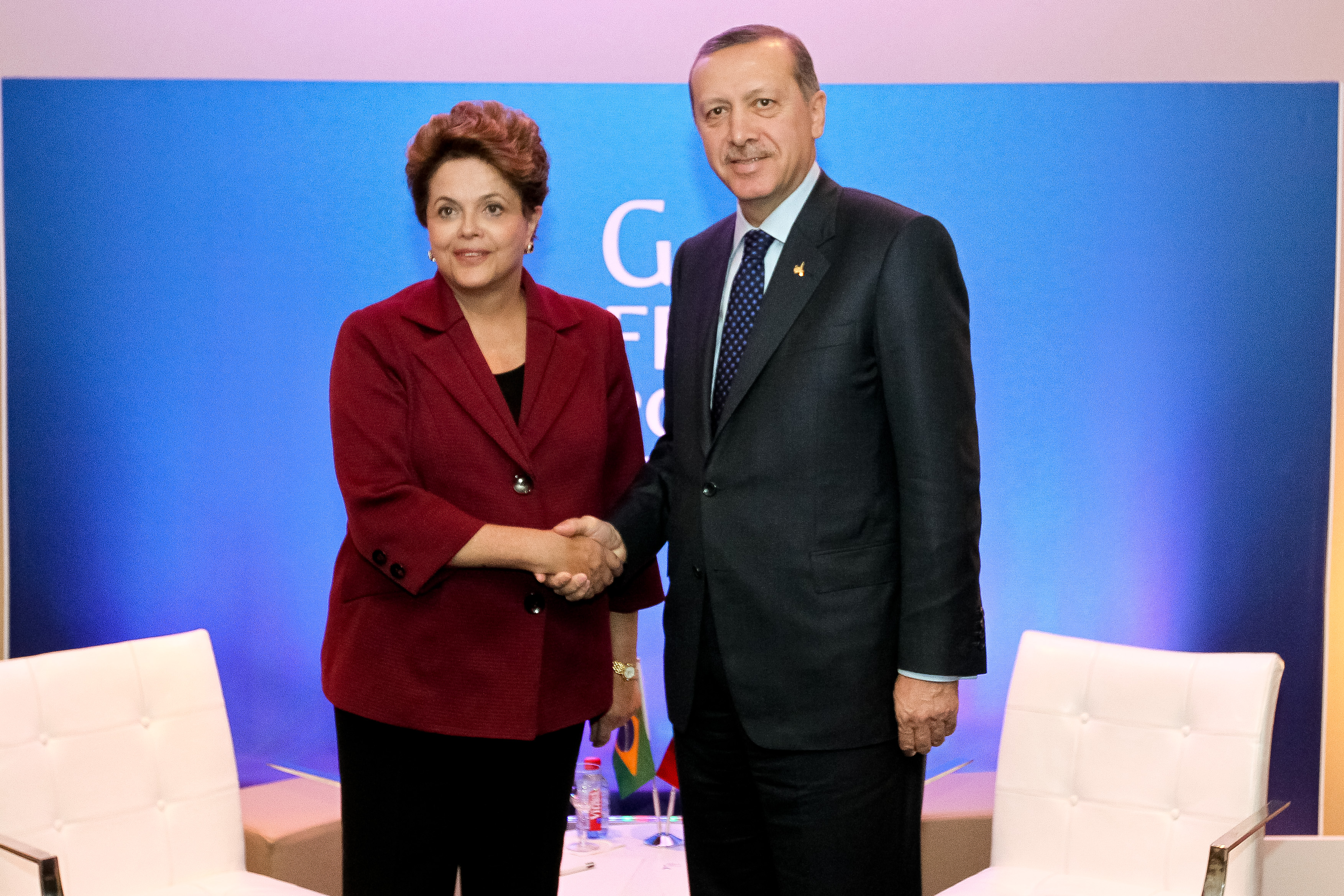 Cannes - França, 04/11/2011. Presidenta Dilma Rousseff durante encontro com o primeiro-ministro da Turquia, Recep Erdogan na Cúpula de Líderes do G20. Foto: Roberto Stuckert Filho/PR.